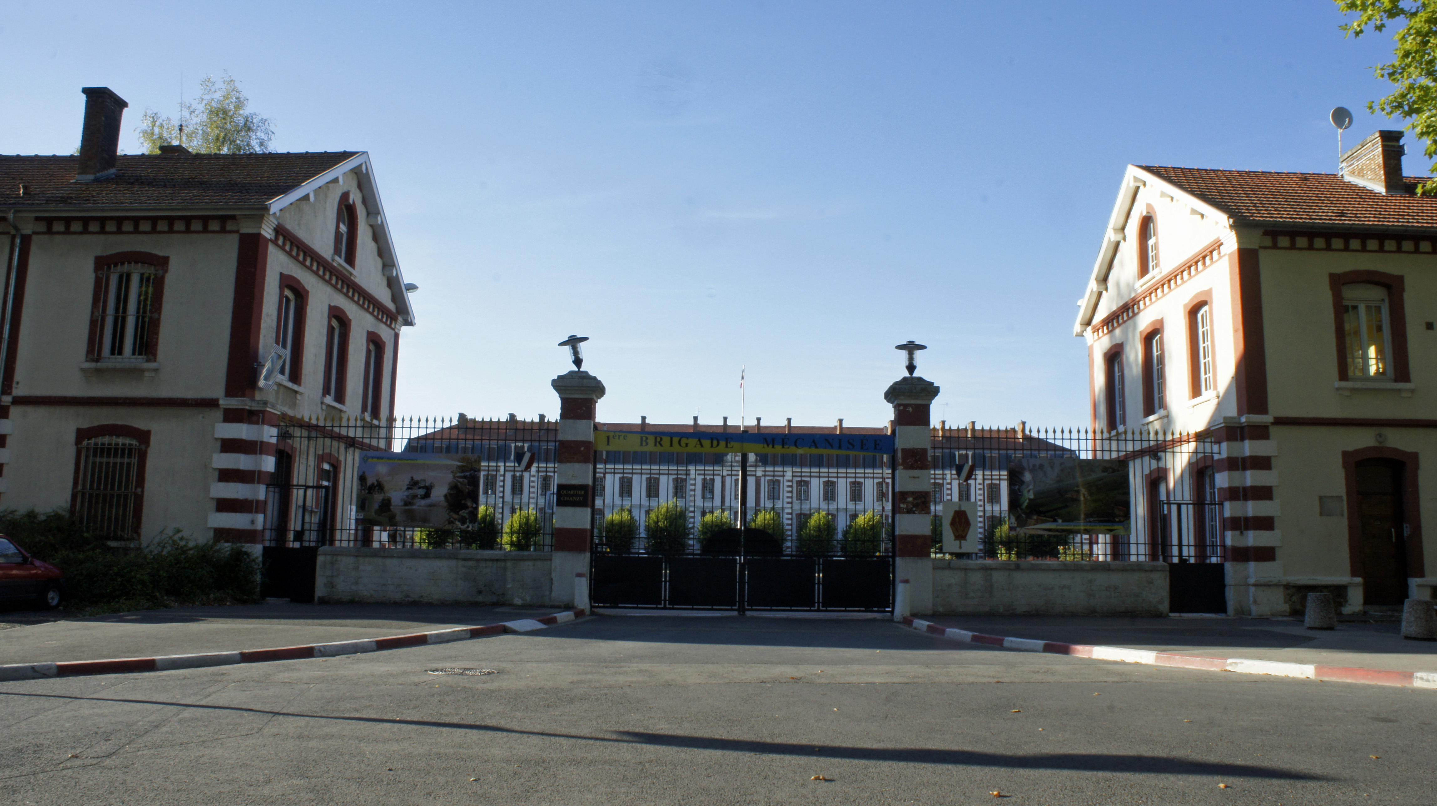 Entrée du Quartier Forgeot Chanzy, siège de la première brigade mécanisée française.